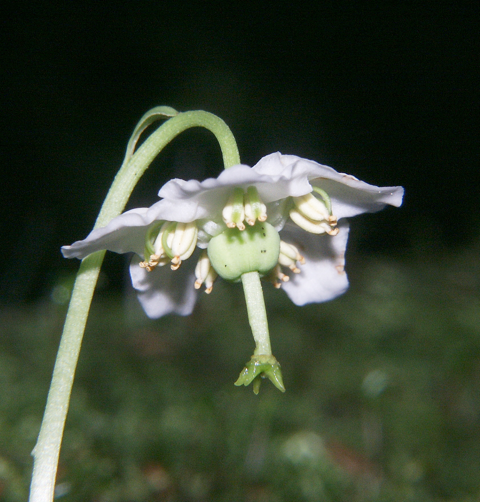 Moneses uniflora, Ridnauntal, Italy